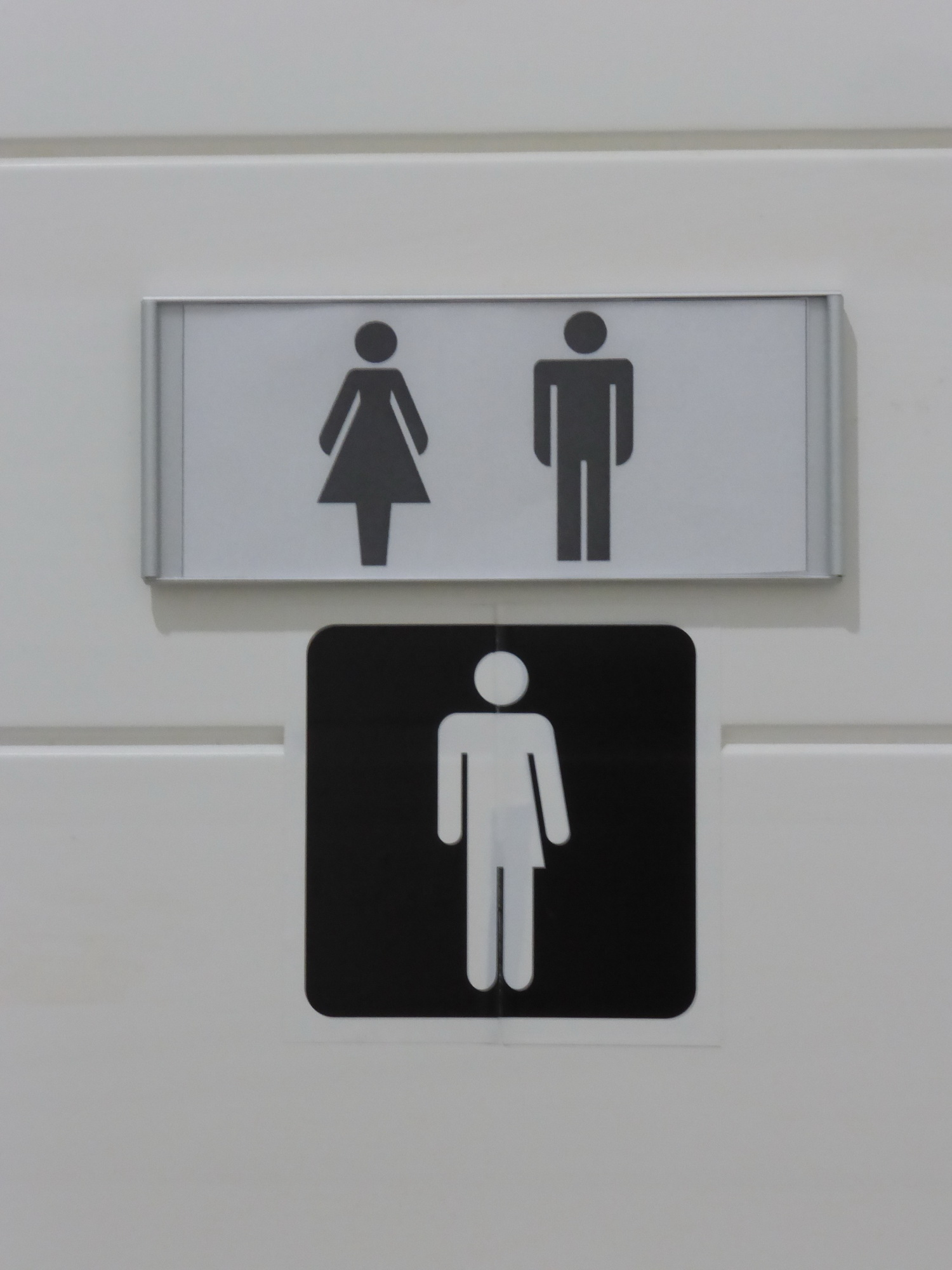 Transgendergerechte Kennzeichnung einer Toilettentür im Fortifications Interpretation Centre in Valletta (Malta)